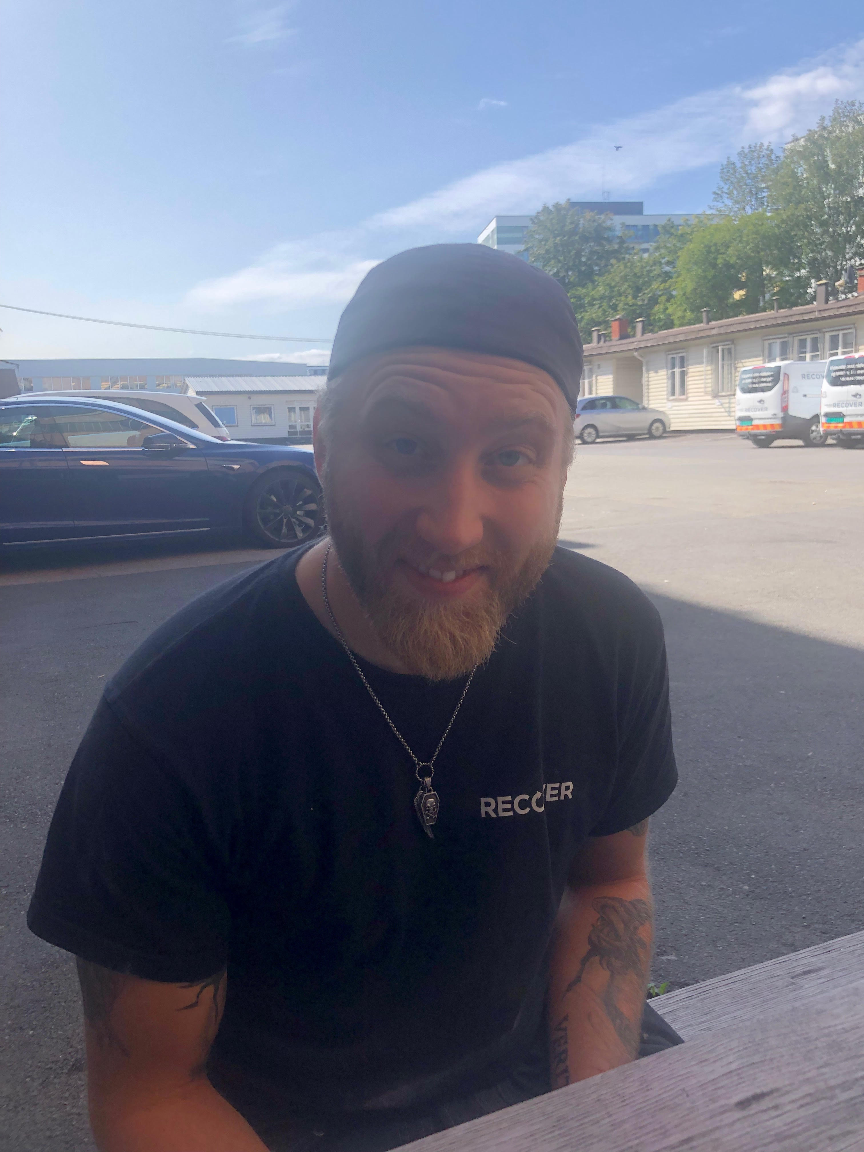 Torbjørn Jensen på jobb i Oslo